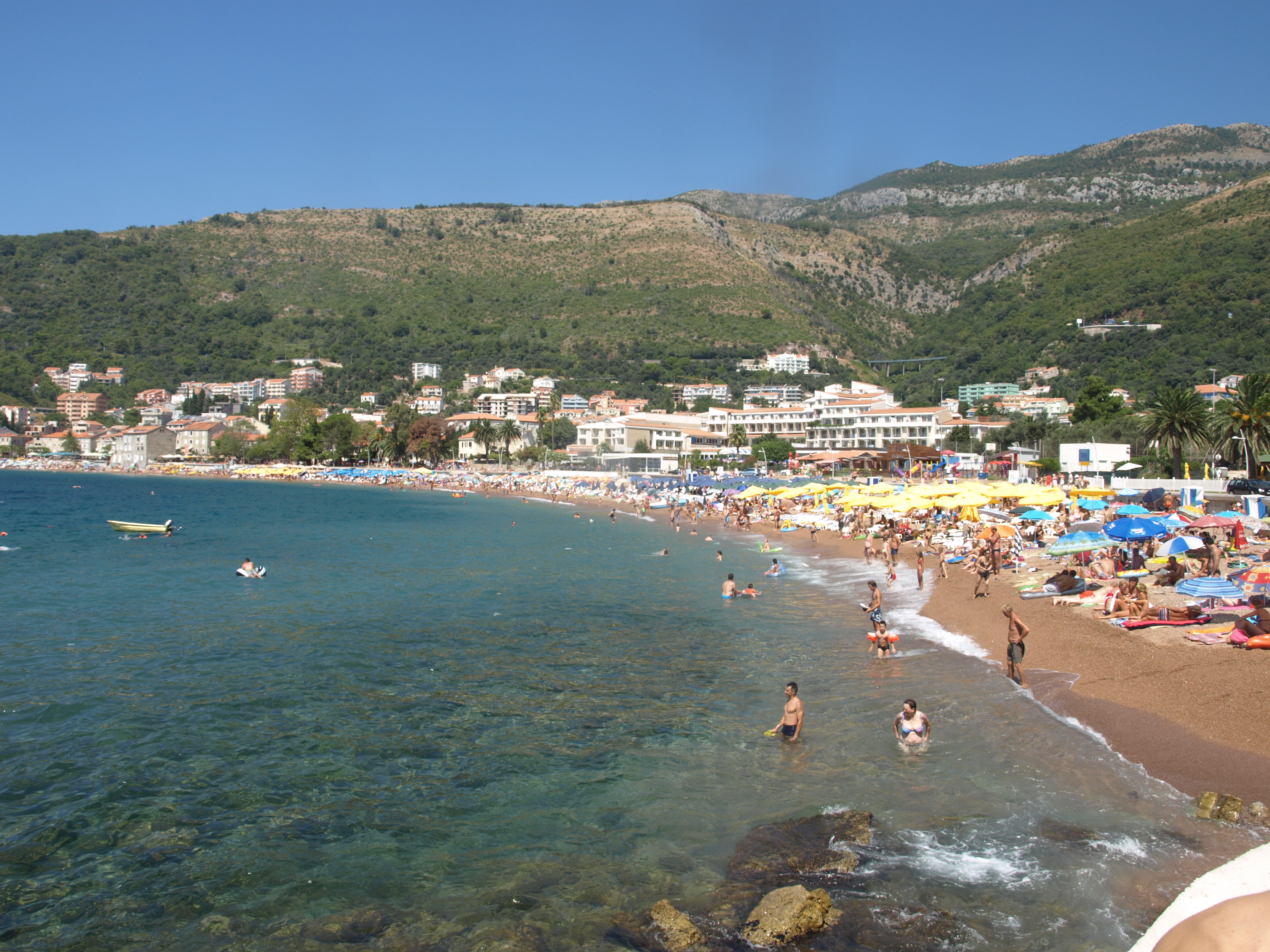 Strand von Pterovac na Moru in Montenegro